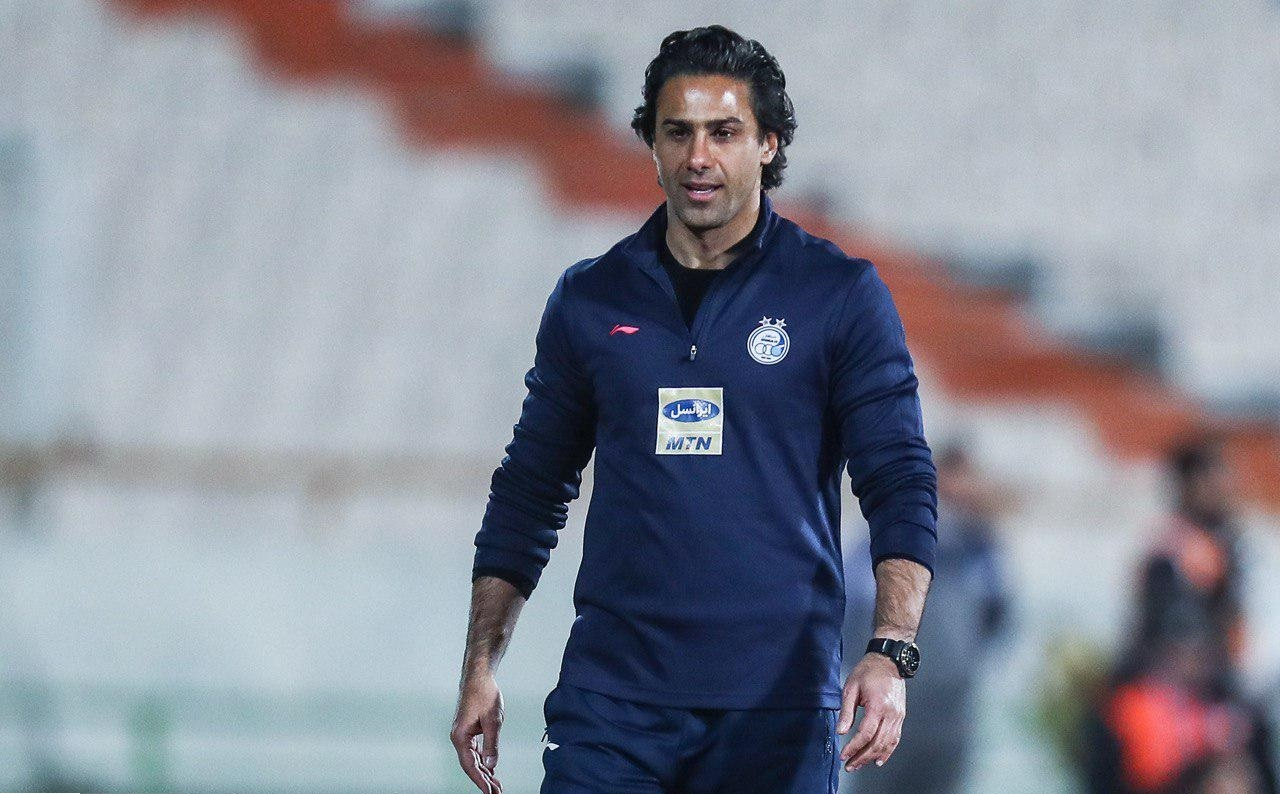 گزارش تصویری از پیروزی پرگل استقلال مقابل شاگردان منصوریان